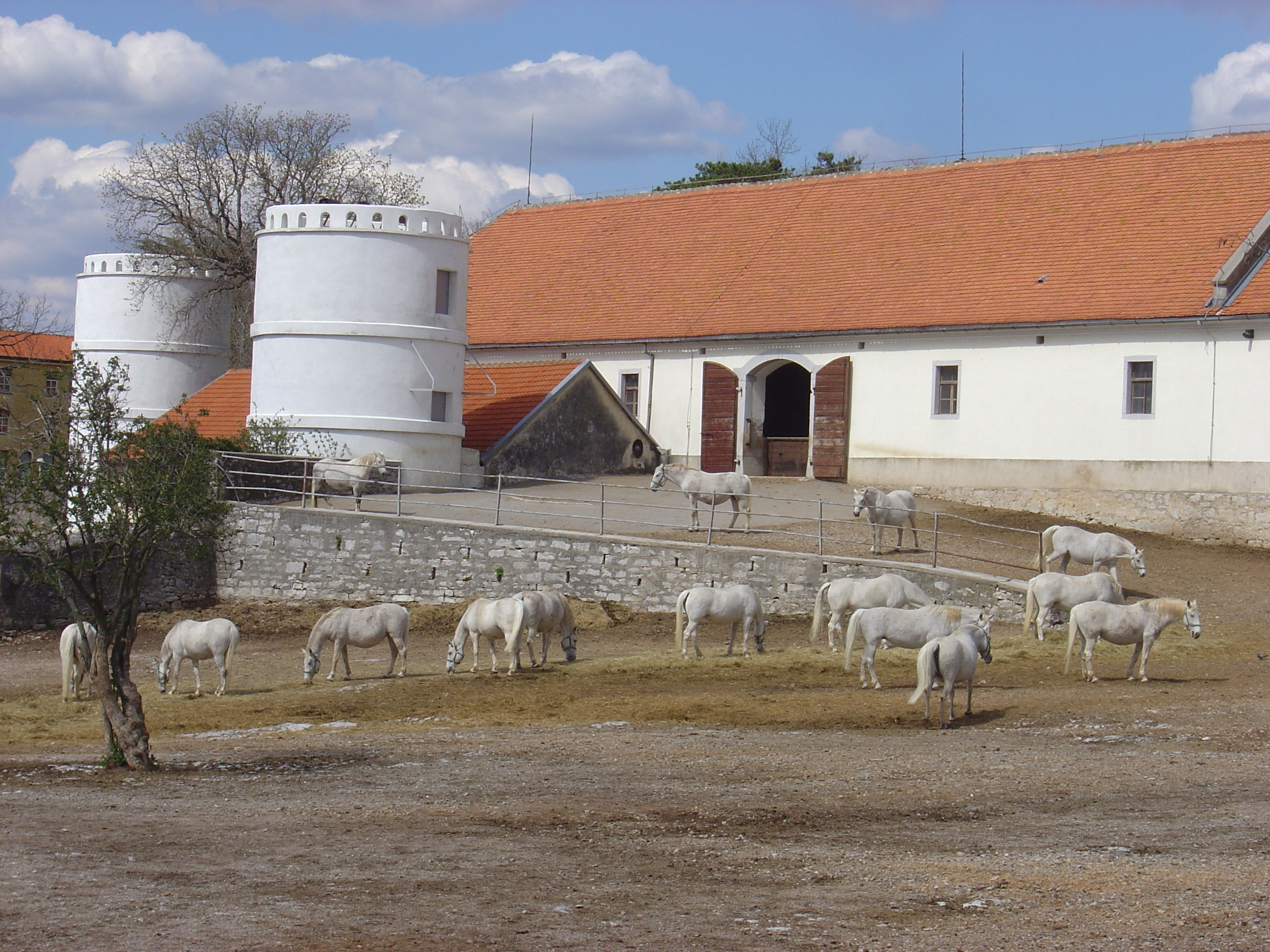 Lipica, Sežana, Slovenia